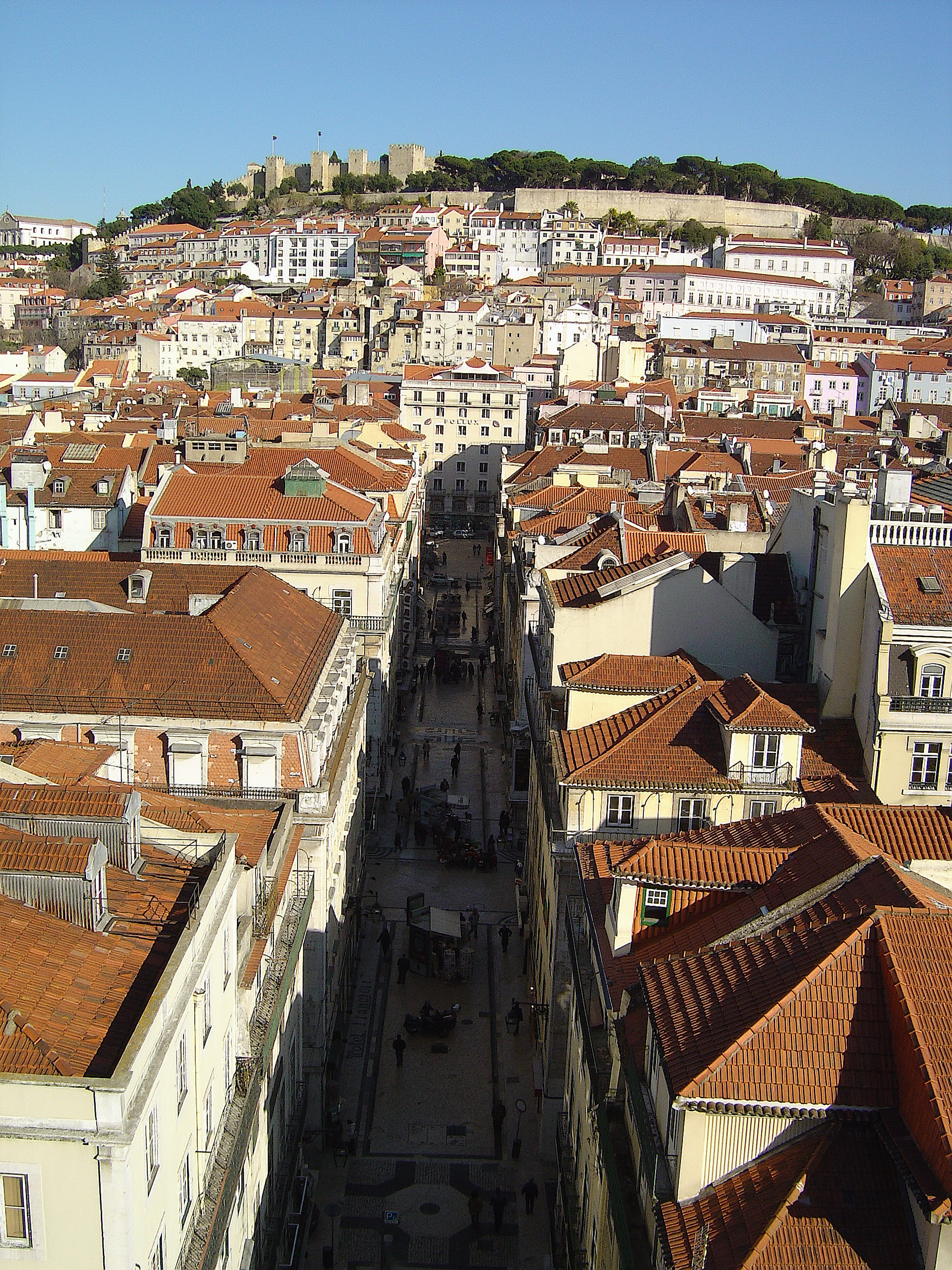 Com o castelo de S. Jorge ao fundo.